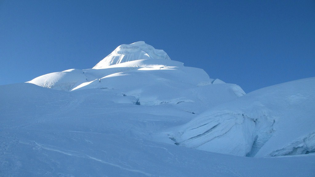 Tocllaraju